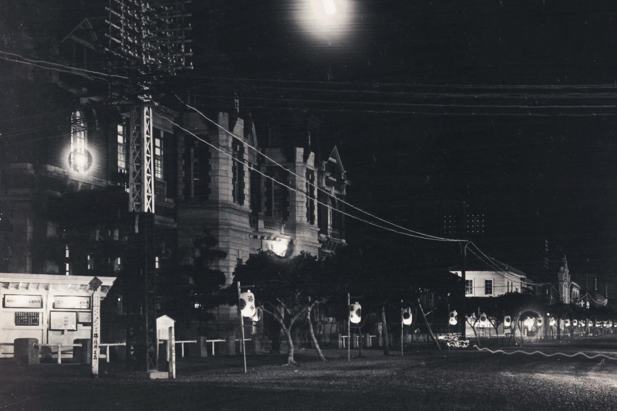 中文（台灣）: 高雄湊町大通夜景。